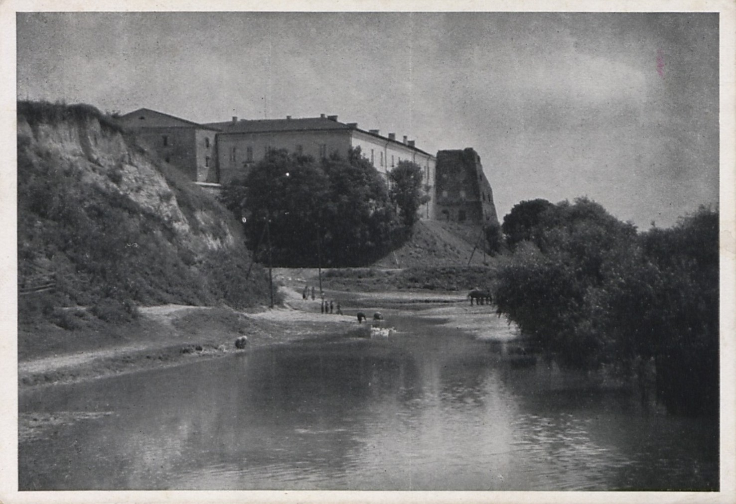 Клевань. Поштівка